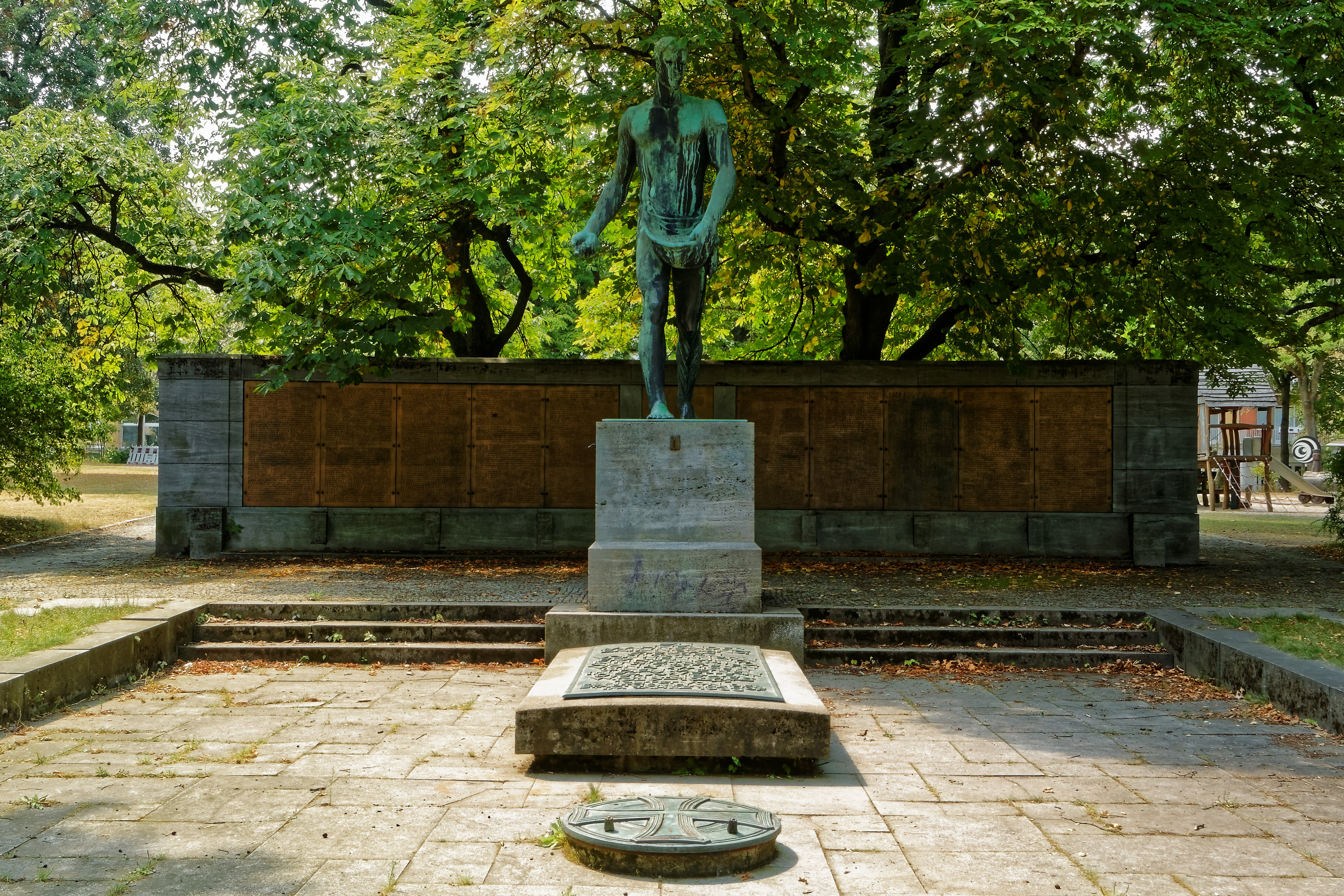 Zwischen Sophienstraße 23 und Wörthstraße 18 im Wittelsbacher Park, Gefallenendenkmal, in Hof/Saale mit Denkmal-Nr. D-4-64-000-219 Exedraförmige Rückwand mit Totentafeln, 1927 von H. Allwang, mit Bronzeplastik eines Sämanns von H. Breitenbach und Lothar Dietz (Gedenkmal mit Totentafeln)This is a photograph of an architectural monument.